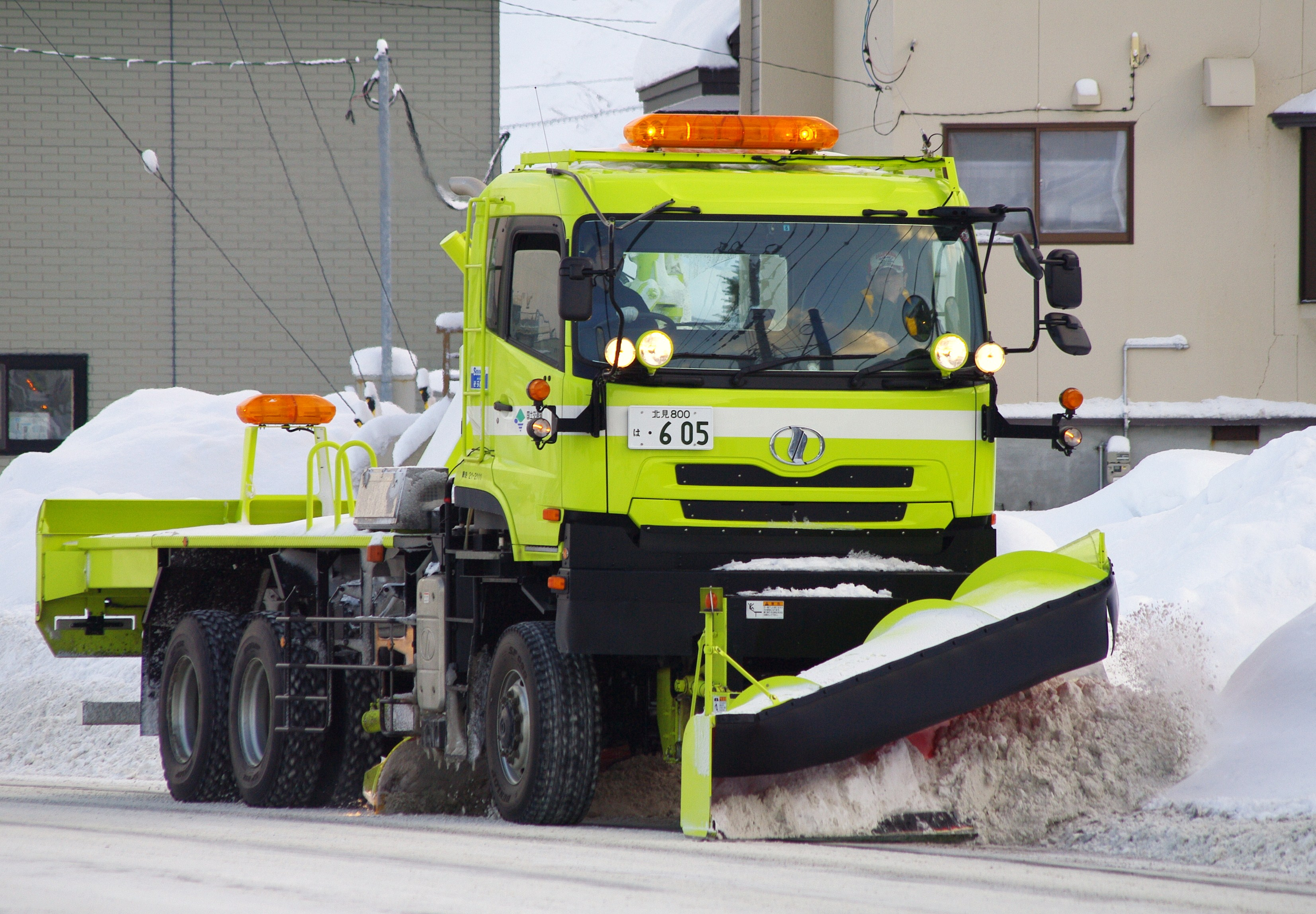 網走市内を除雪する北海道開発局の除雪車(UDトラックス・クオン)